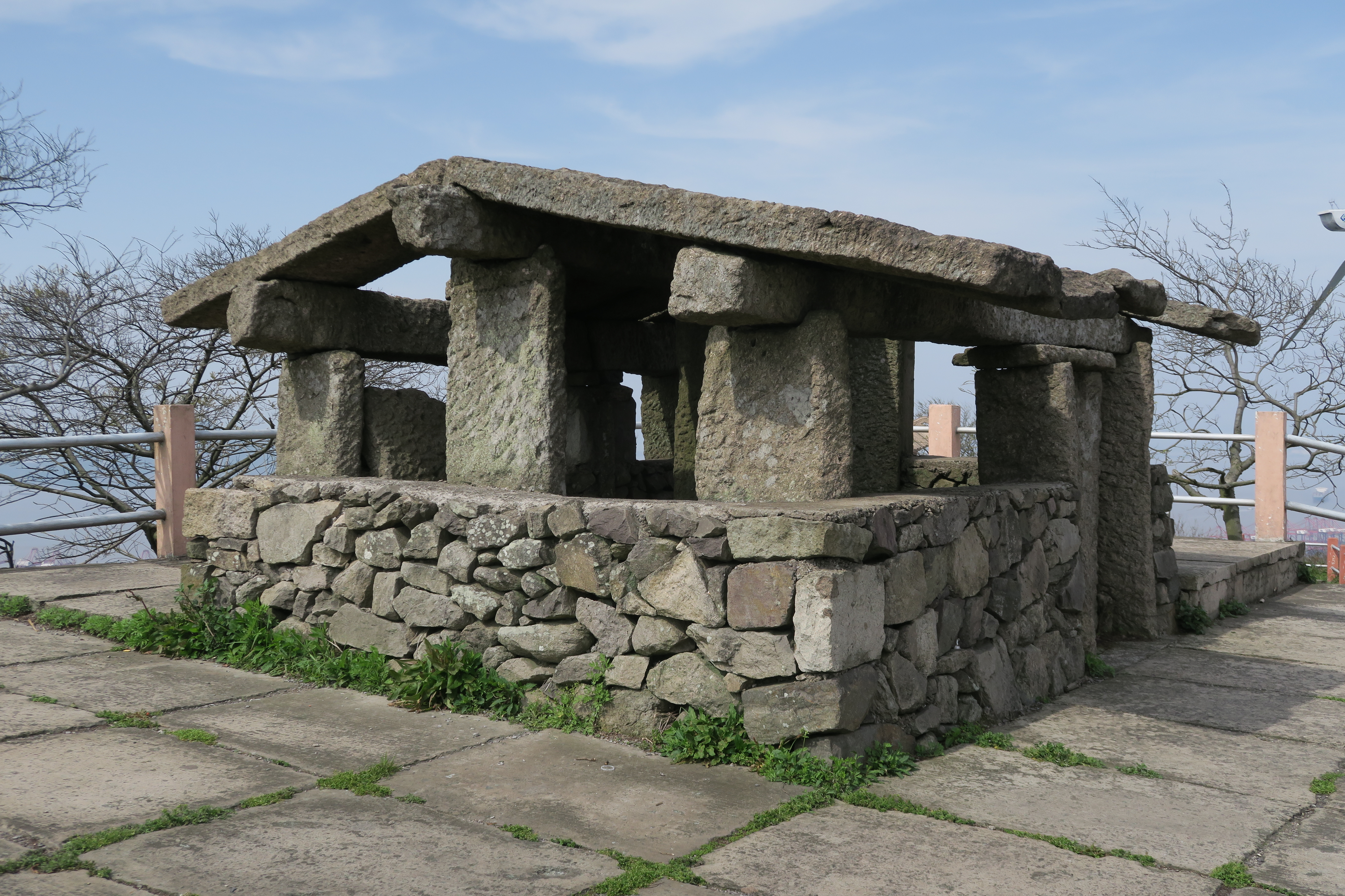 总台山烽火台